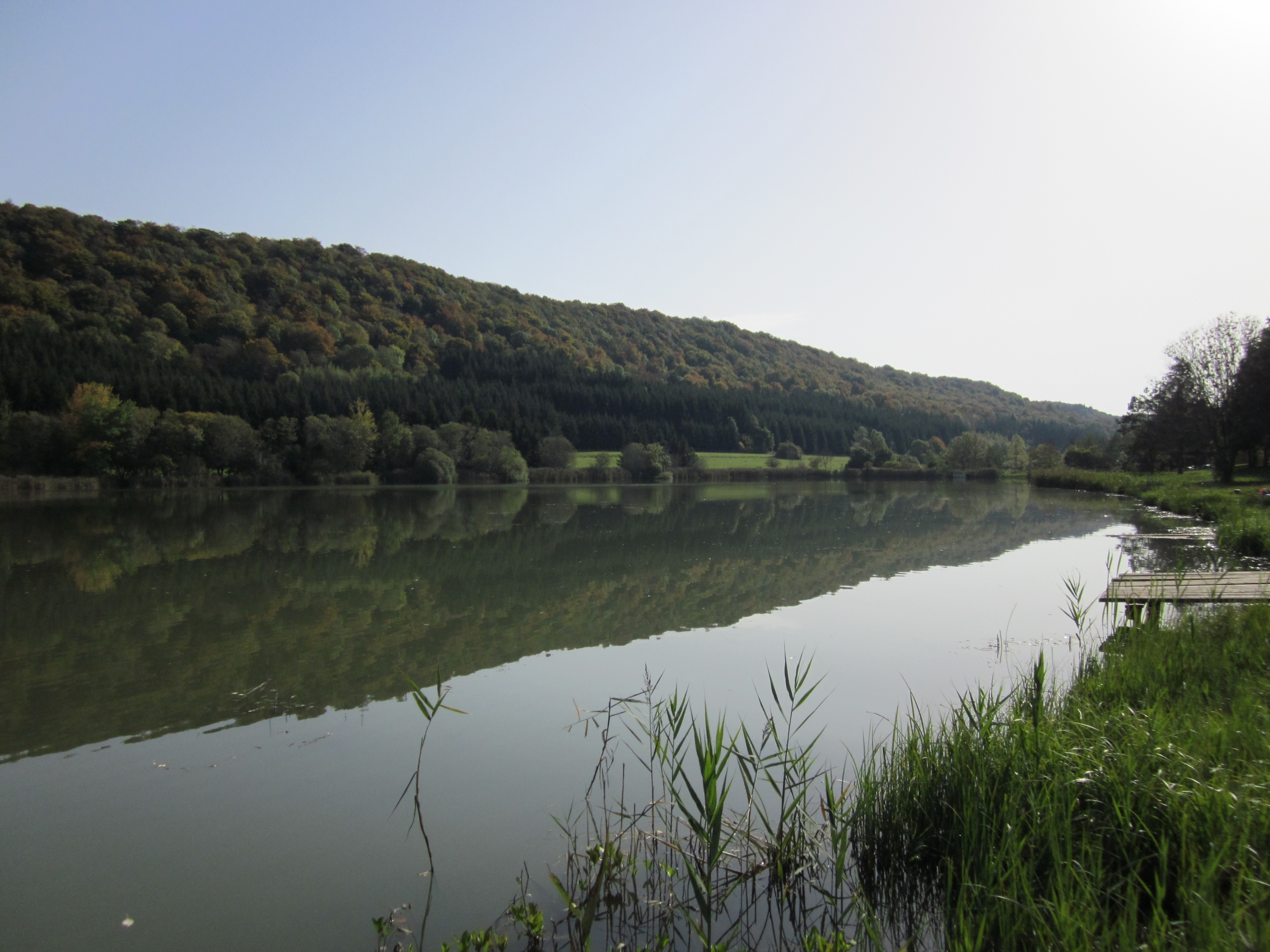 petit lac artificiel de Besain (Jura) (7 ha), creusé au pied de la côte de l'Heute